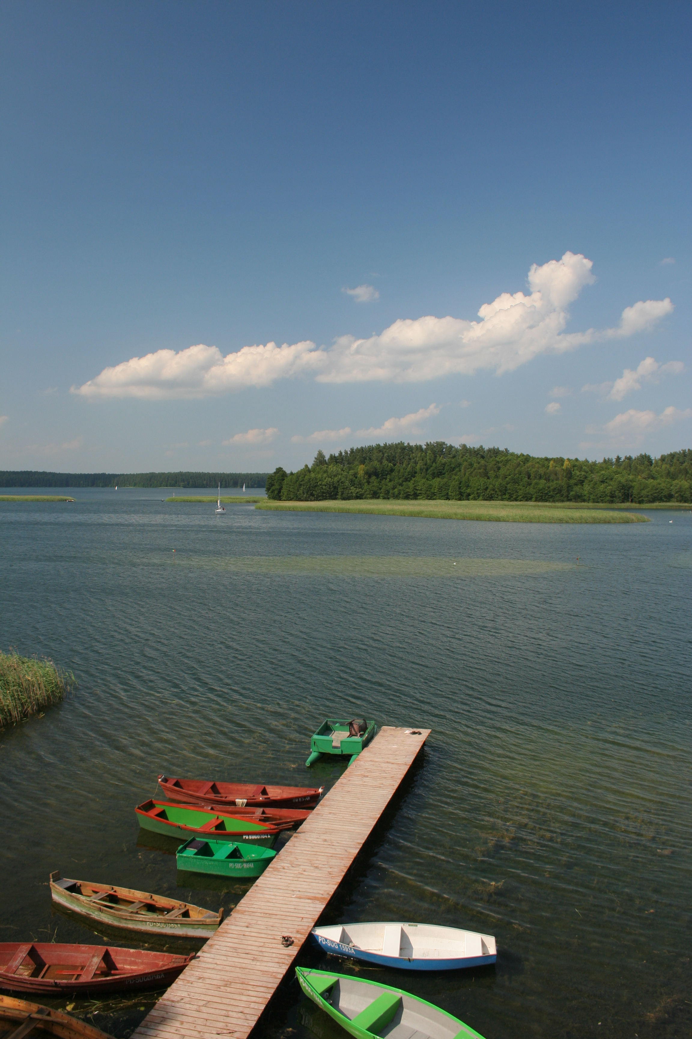 Molo we wsi Bryzgiel.